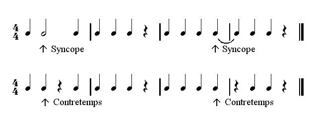 Description : Syncopes et contretemps Source : Personnelle Licence : GFDL